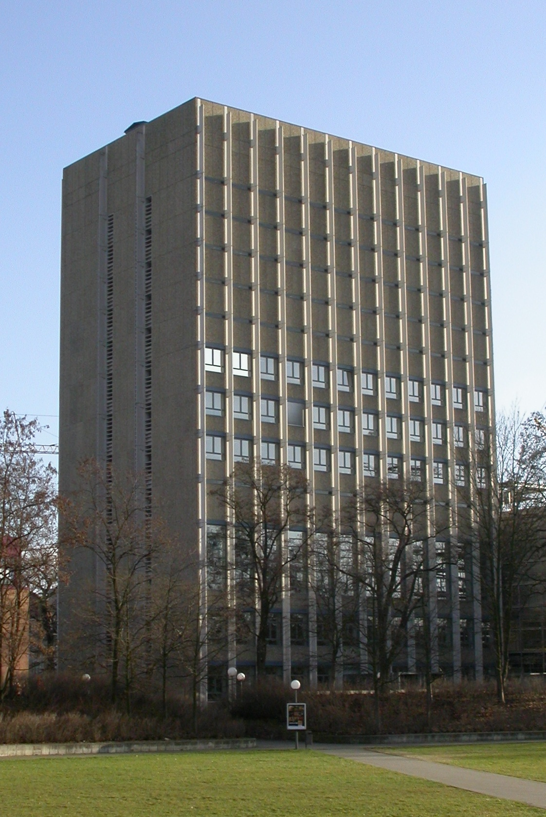 Bibliothek der Fridericiana, Karlsruhe